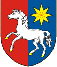 znak obce